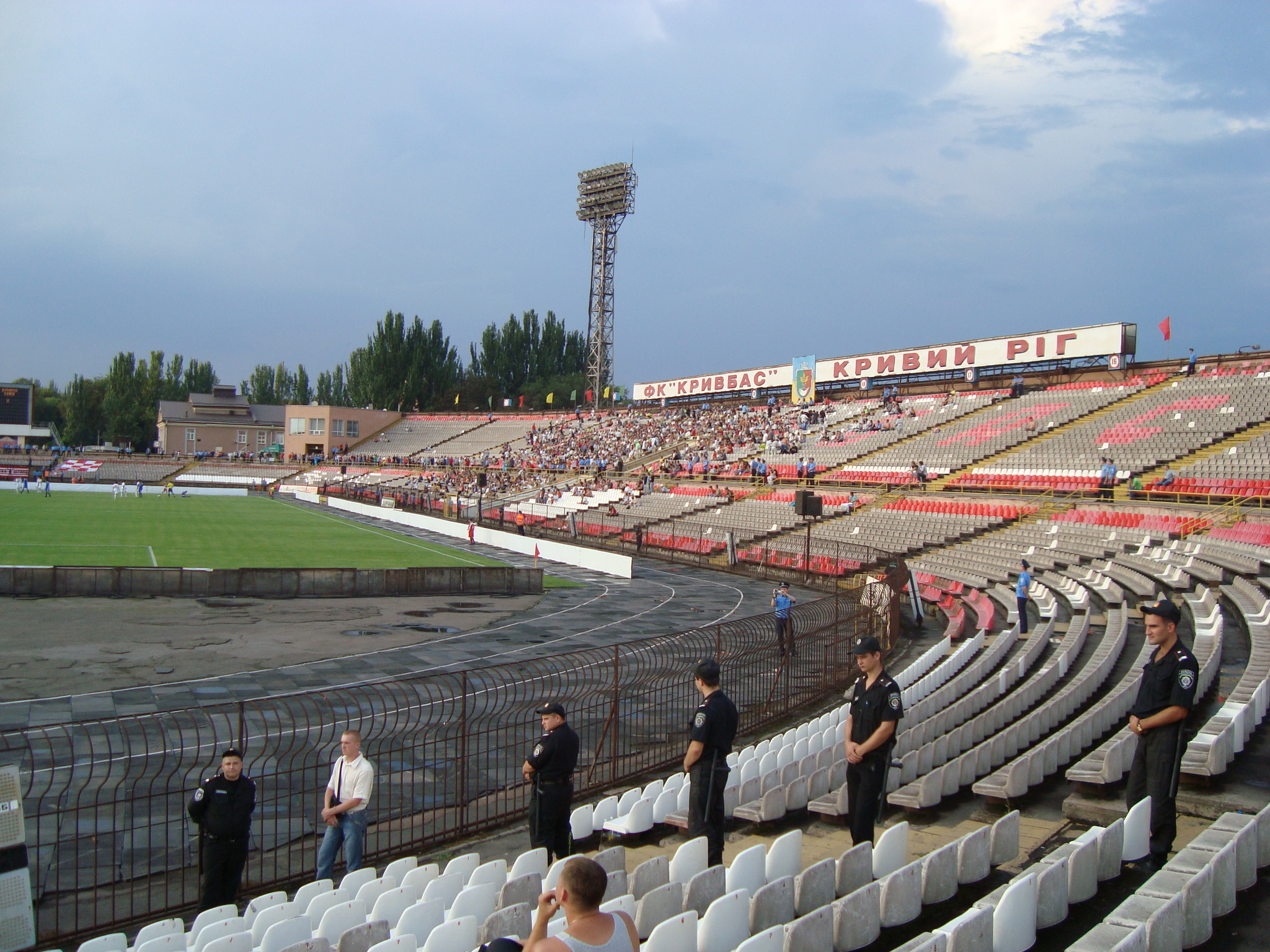 Стадіон «Металург» у Кривому Розі